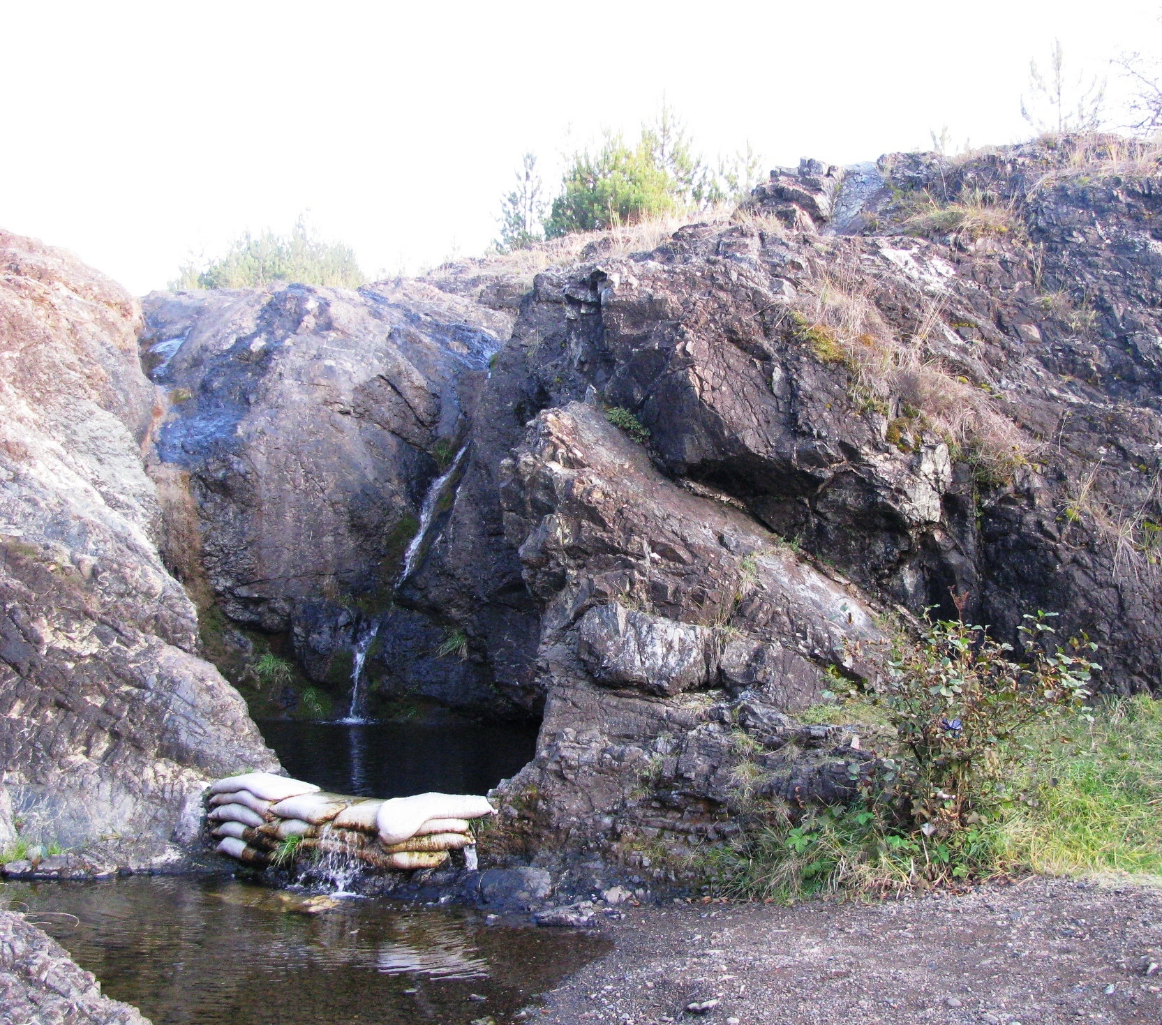 Водопад у Мрамору - село Скакавци код Косјерића.